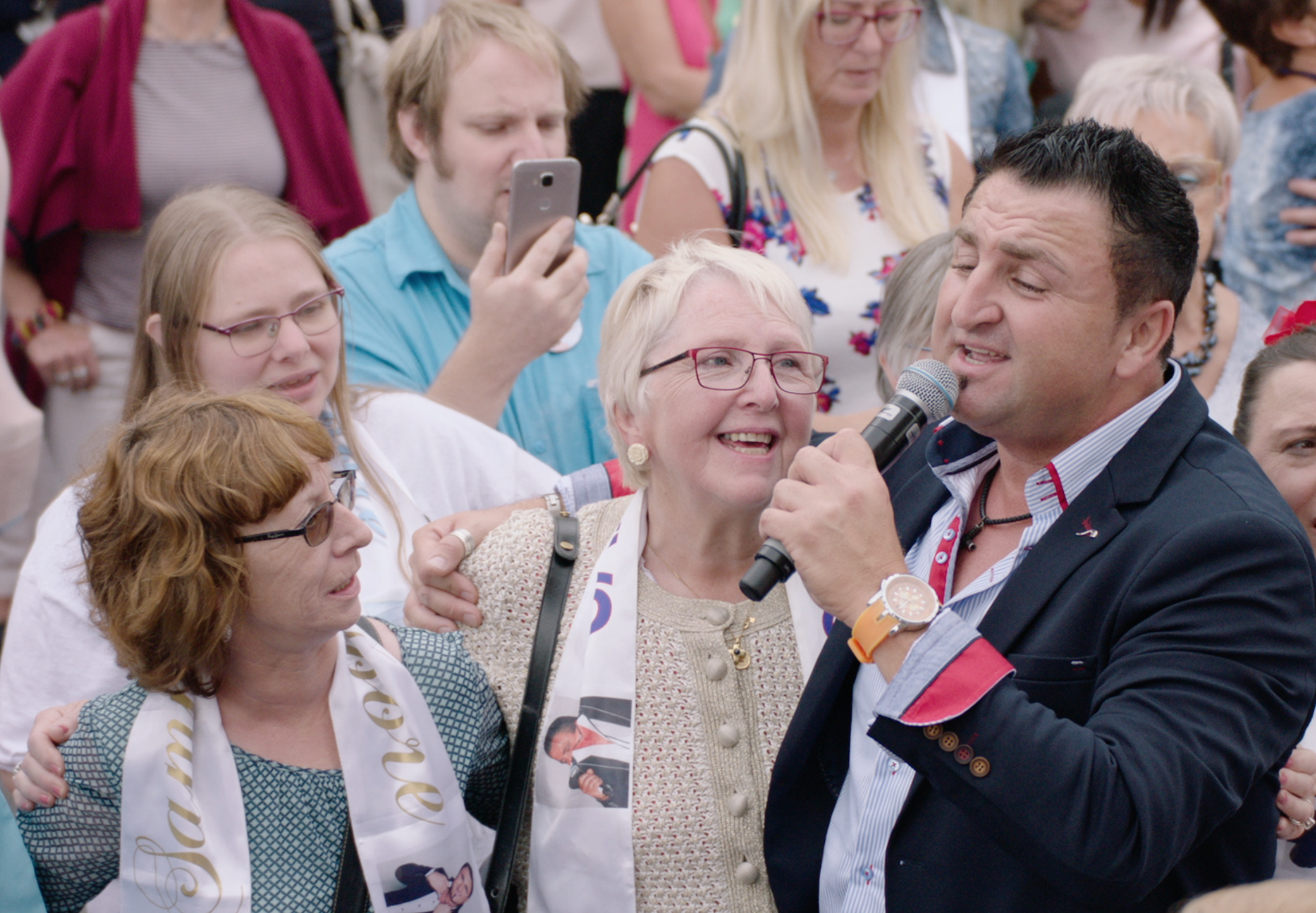 Sammy Moore met zijn moeder tijdens zijn optreden op de jaarmarkt in Leuven, 2017